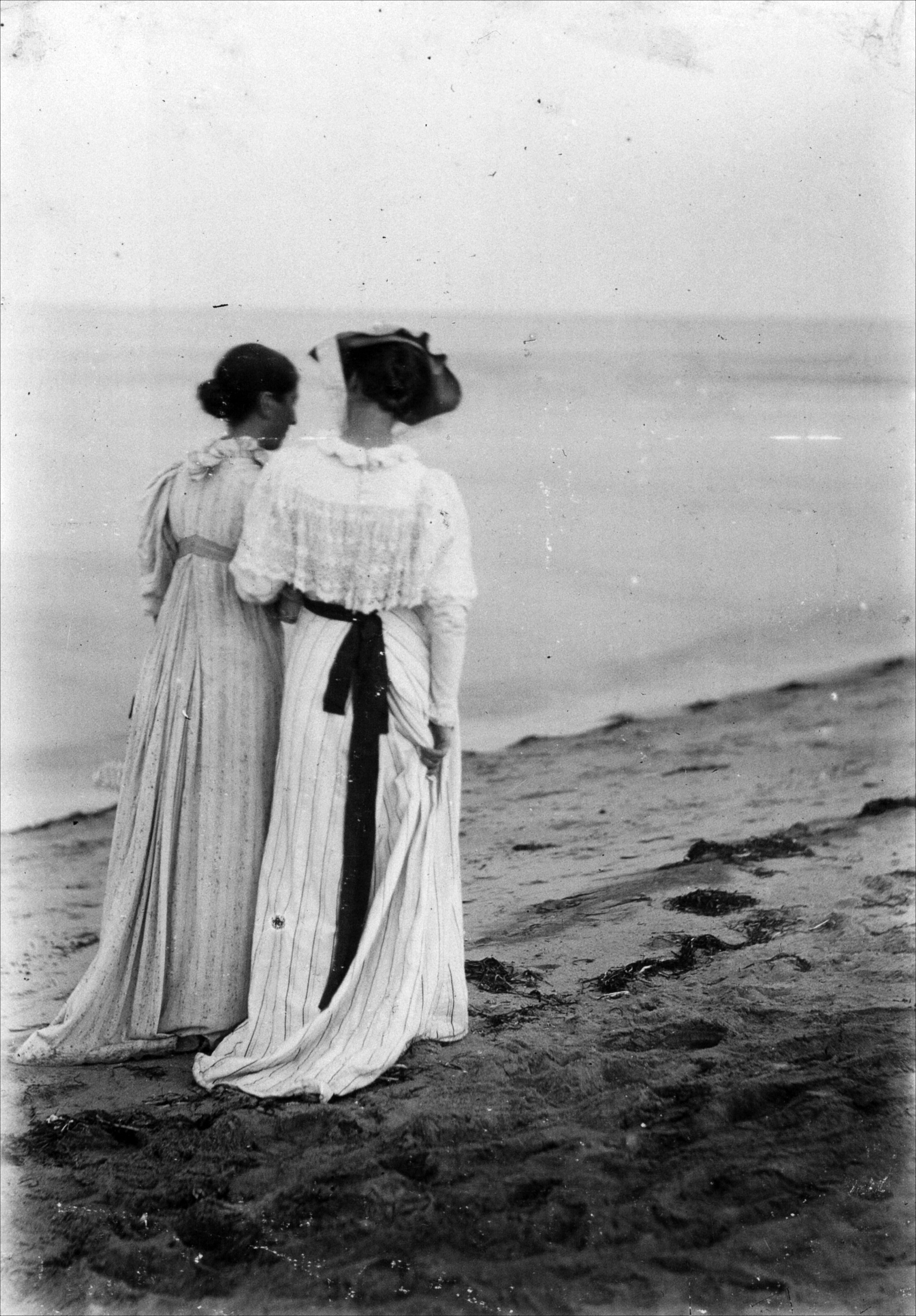 Foto af P.S. Krøyer Anna Ancher og Marie Krøyer på Skagens Sønderstrand